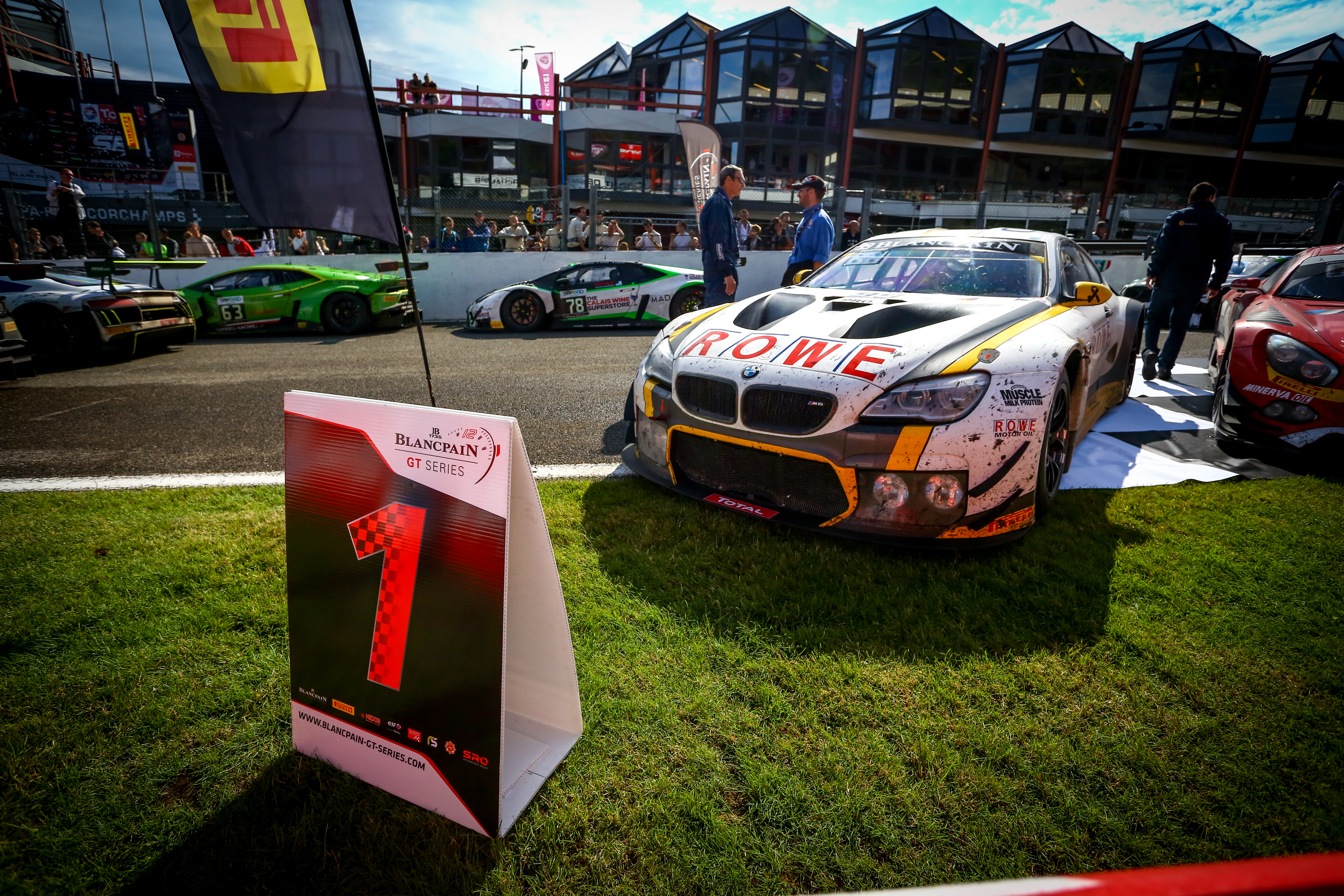 Siegerfoto ROWE RACING 24h Spa 2016